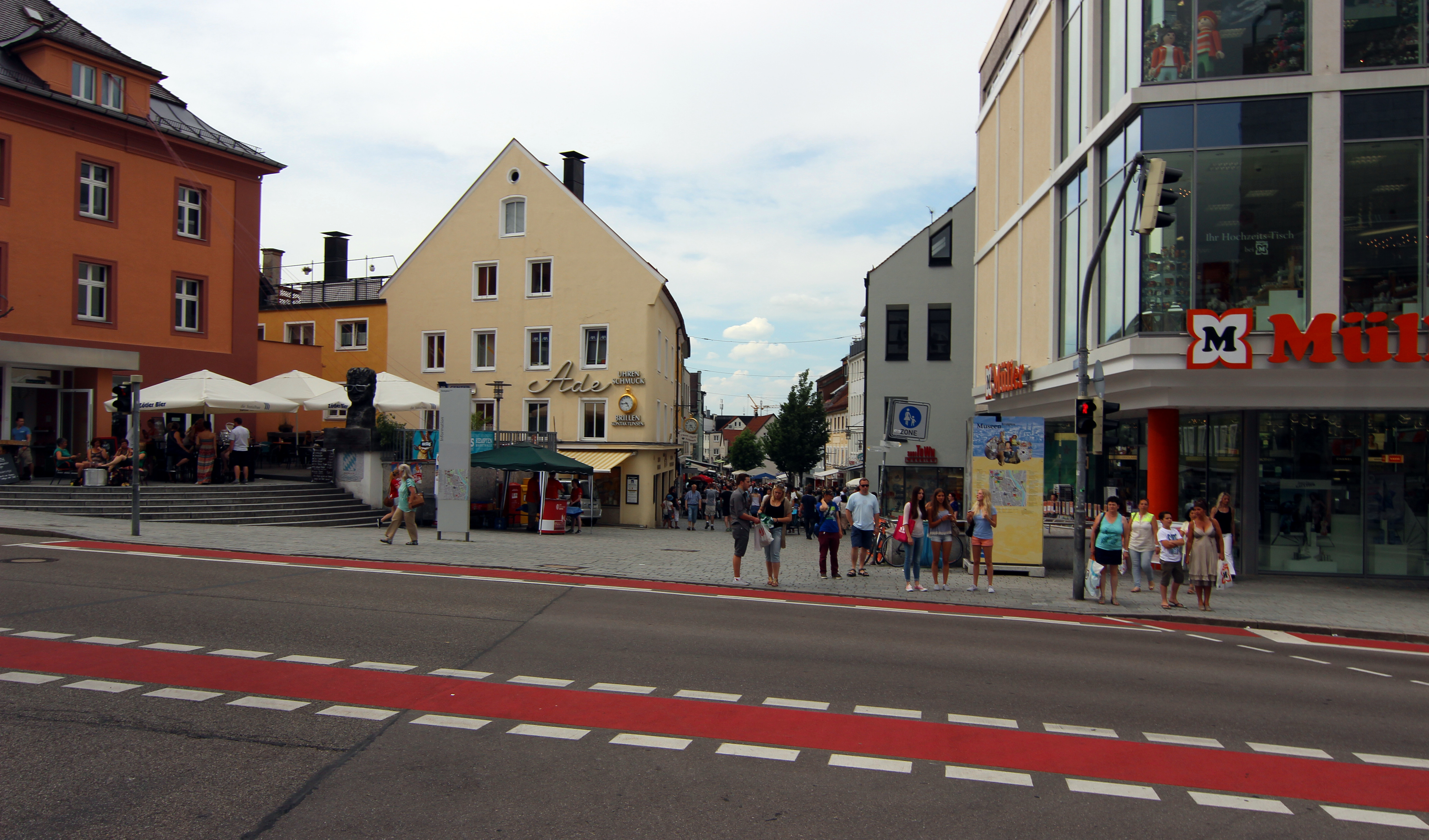 Südlicher Bereich der Fischerstraße, Kempten